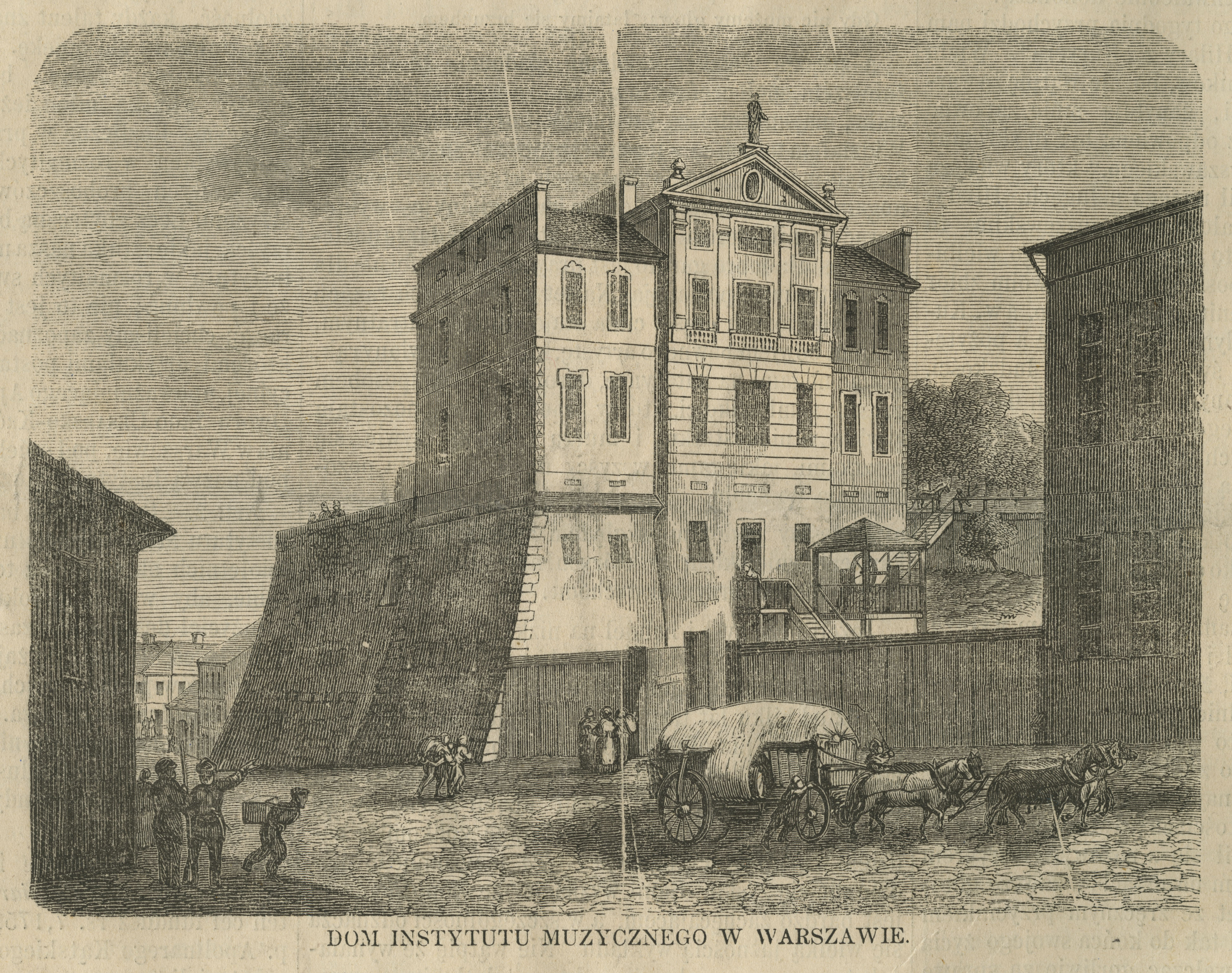 Dom Instytutu Muzycznego w Warszawie